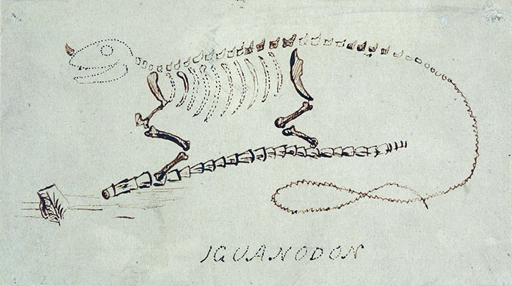 Gideon Mantell's Iguanodon restoration.